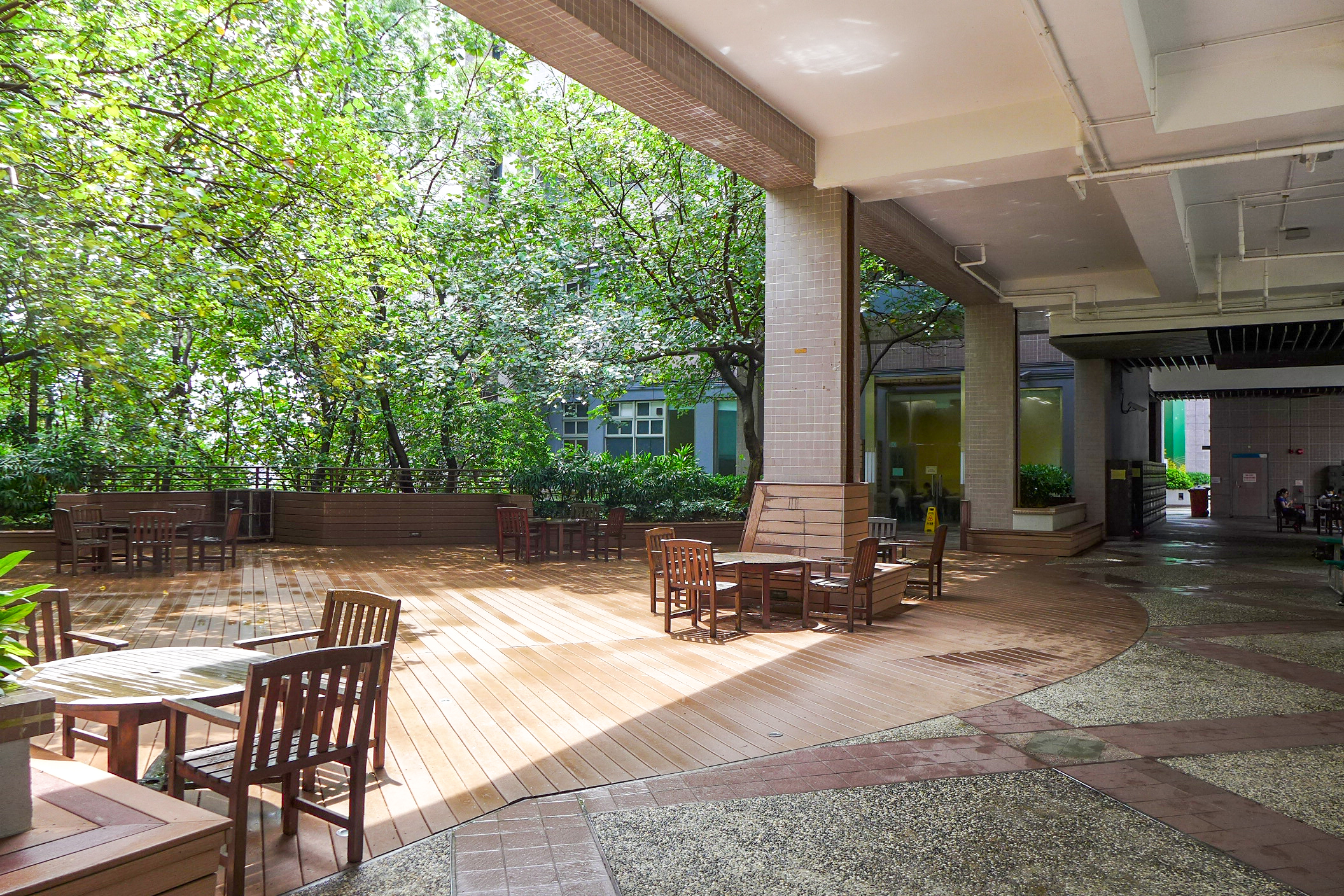 IVE Tsing Yi Campus Seating area